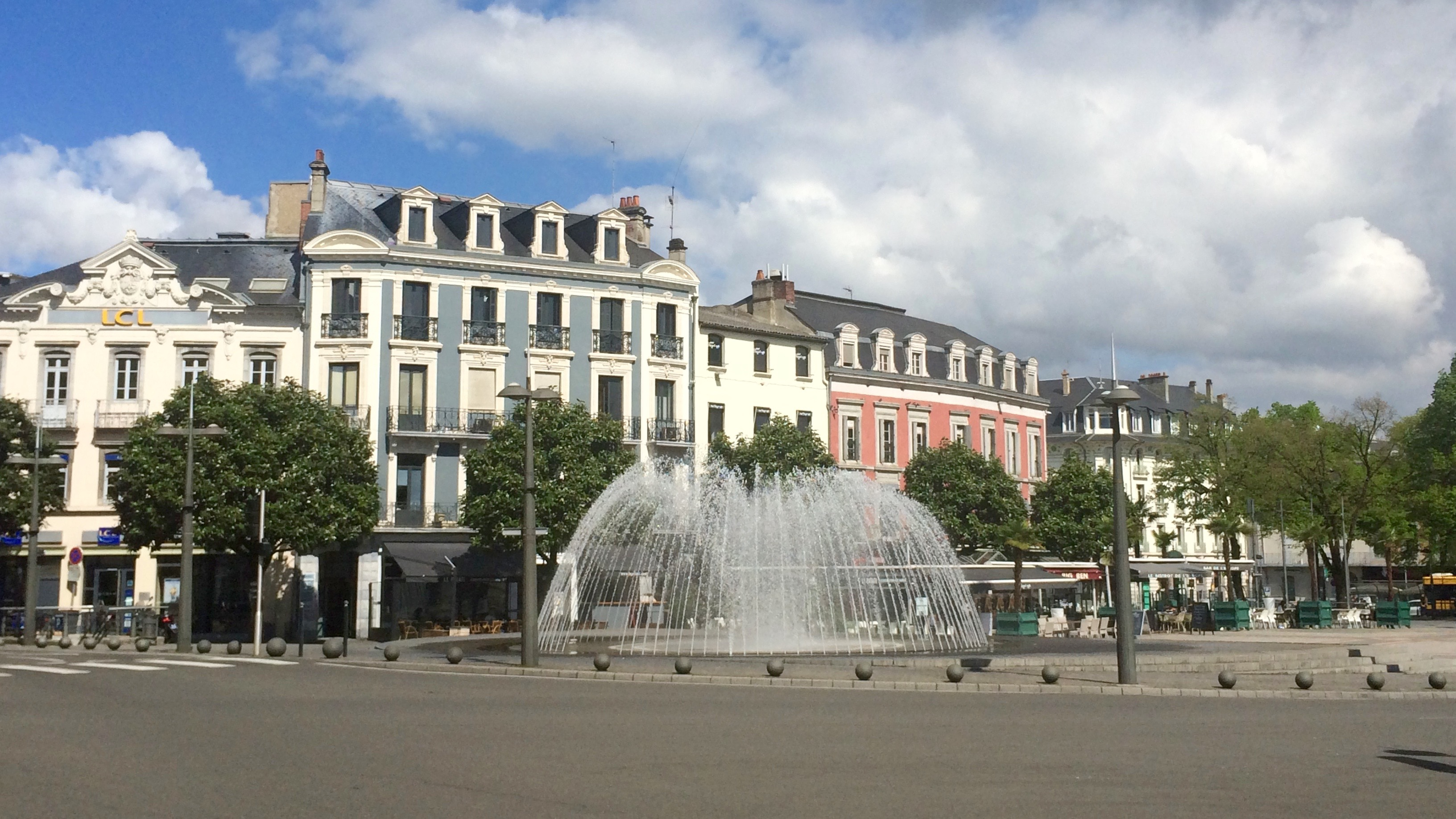 Place de Verdun, Tarbes, Hautes-Pyrénées, France